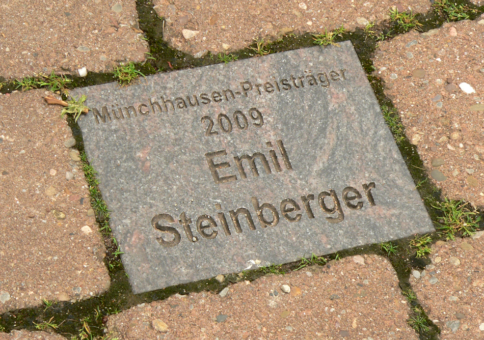 Steinplatte für den Münchhausen Preisträger Emil Steinberger in Bodenwerder am Rathaus